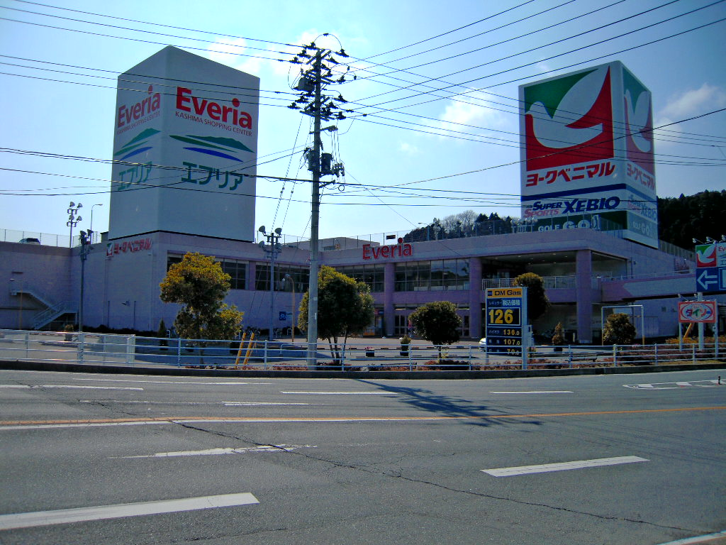 鹿島ショッピングセンター